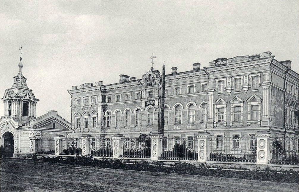 Томская духовная семинария